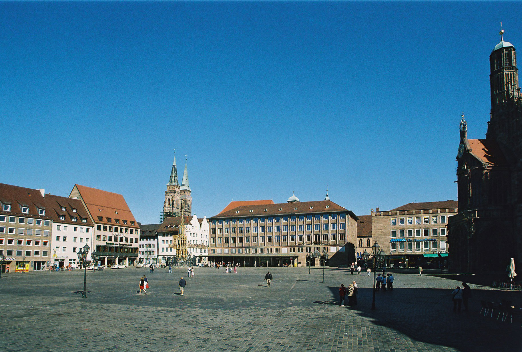 Der Hauptmarkt in Nürnberg von Südosten. Im Hintergrund die Türme von St. Sebald, davor der Schöne Brunnen. Rechts im Bild die Frauenkirche.